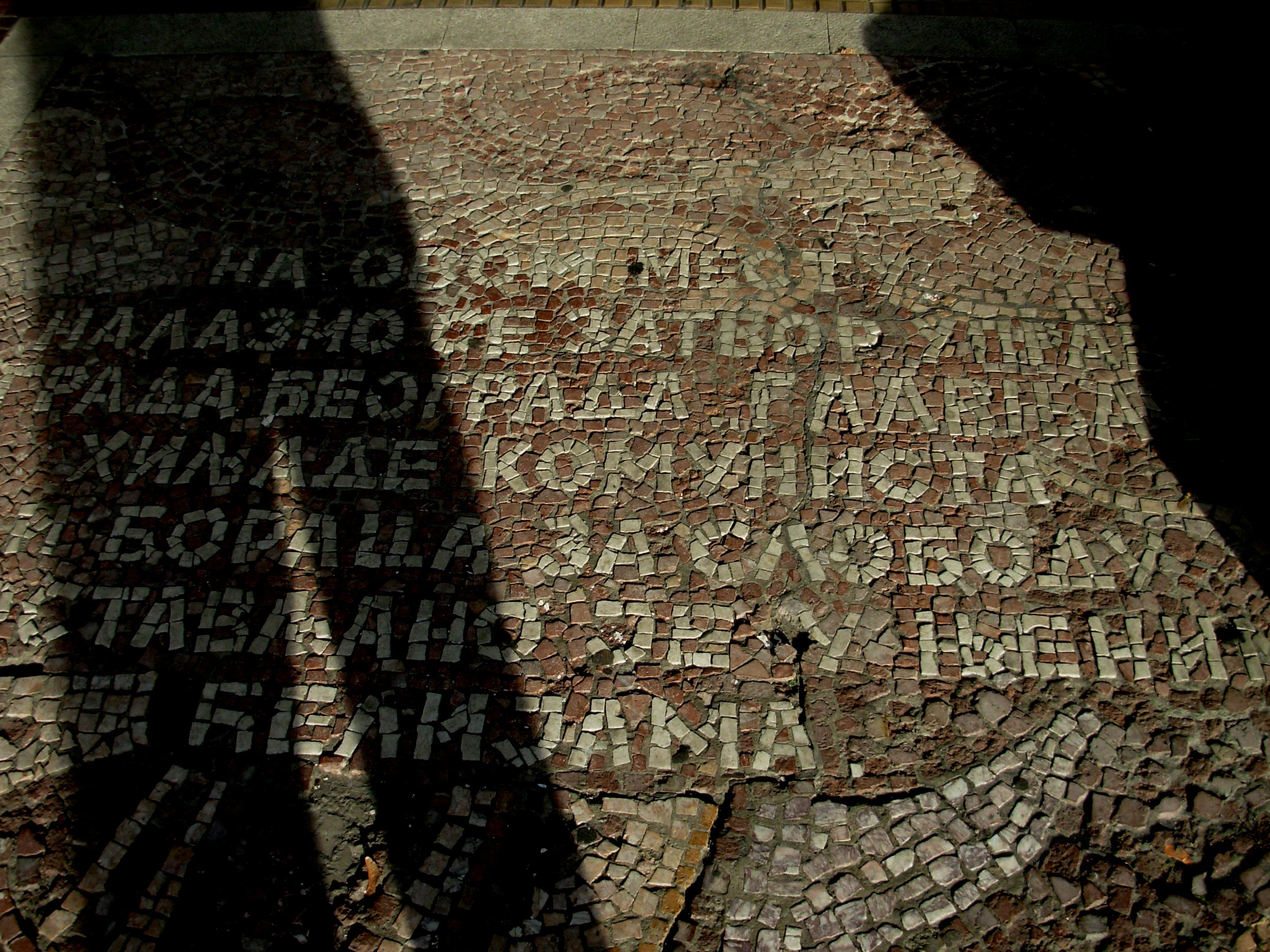 Glavnjača - zapis u mozaiku, ulica Braće Jugović, Beograd. Slikao Goldfinger